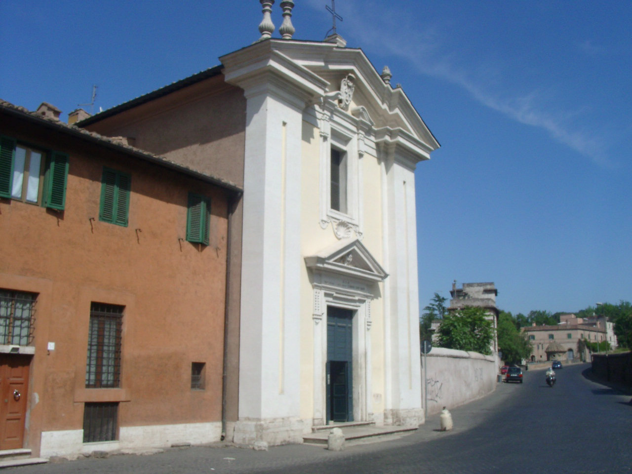 Kirche Quo Vadis an der Via Appia.